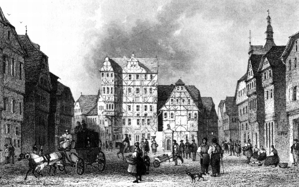 Ernst Friedrich Grünewald: Marktplatz Gießen